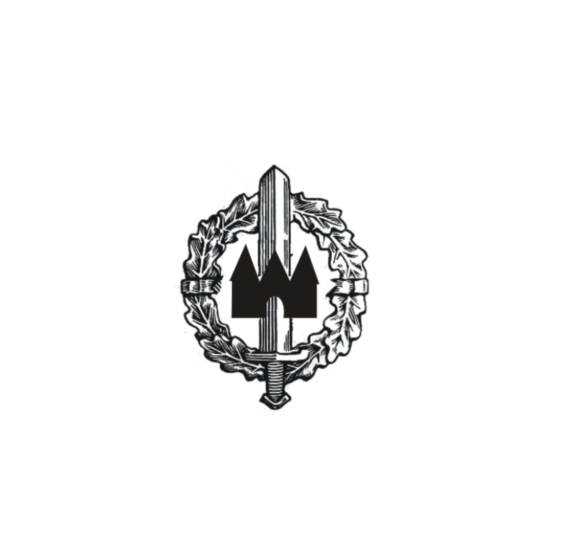 лого на "Черноморска сила ЕООД"